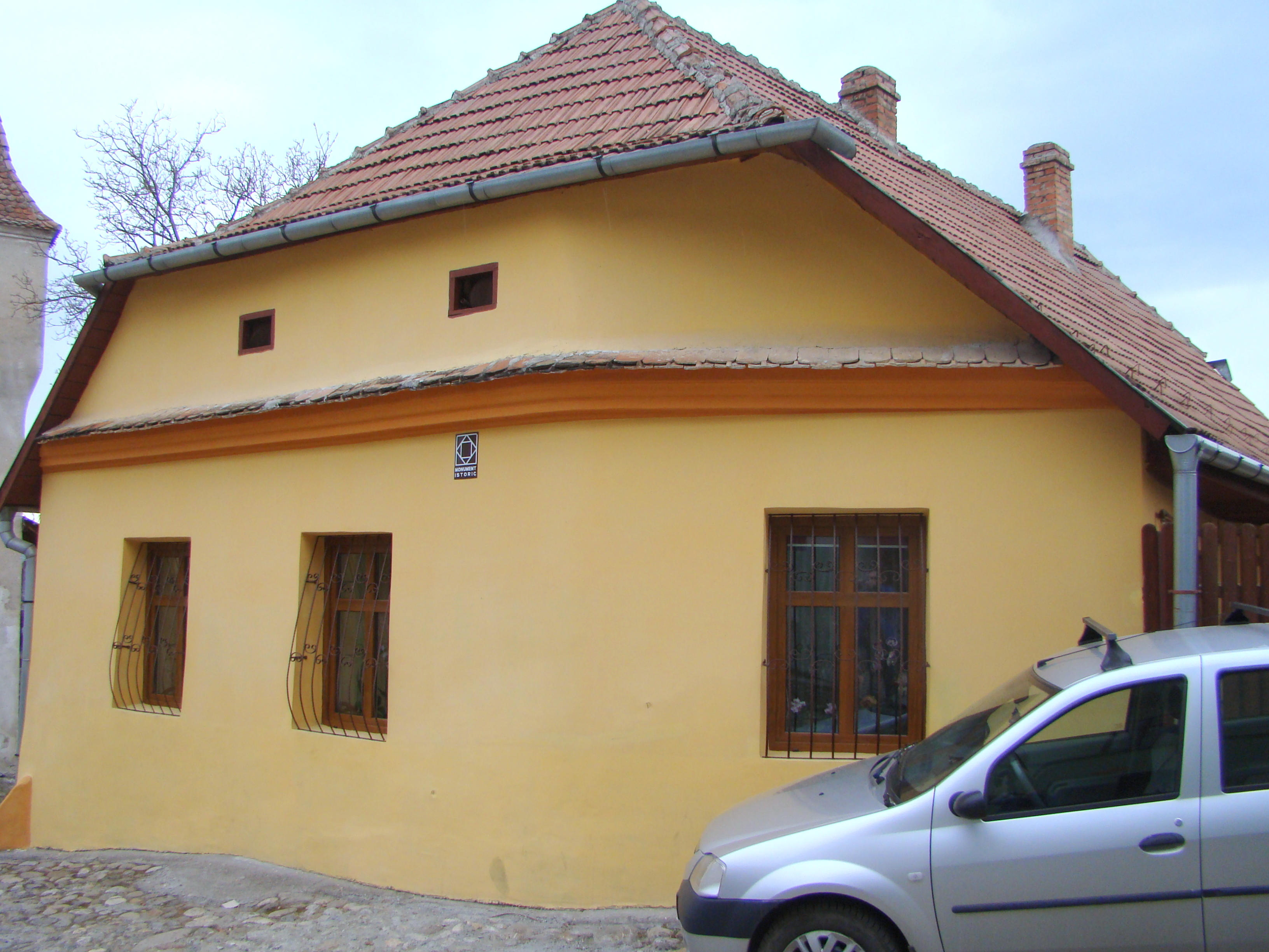 Casa Tichy, municipiul Sighișoara, str. Cojocarilor 8 sec. XVII - XVIII